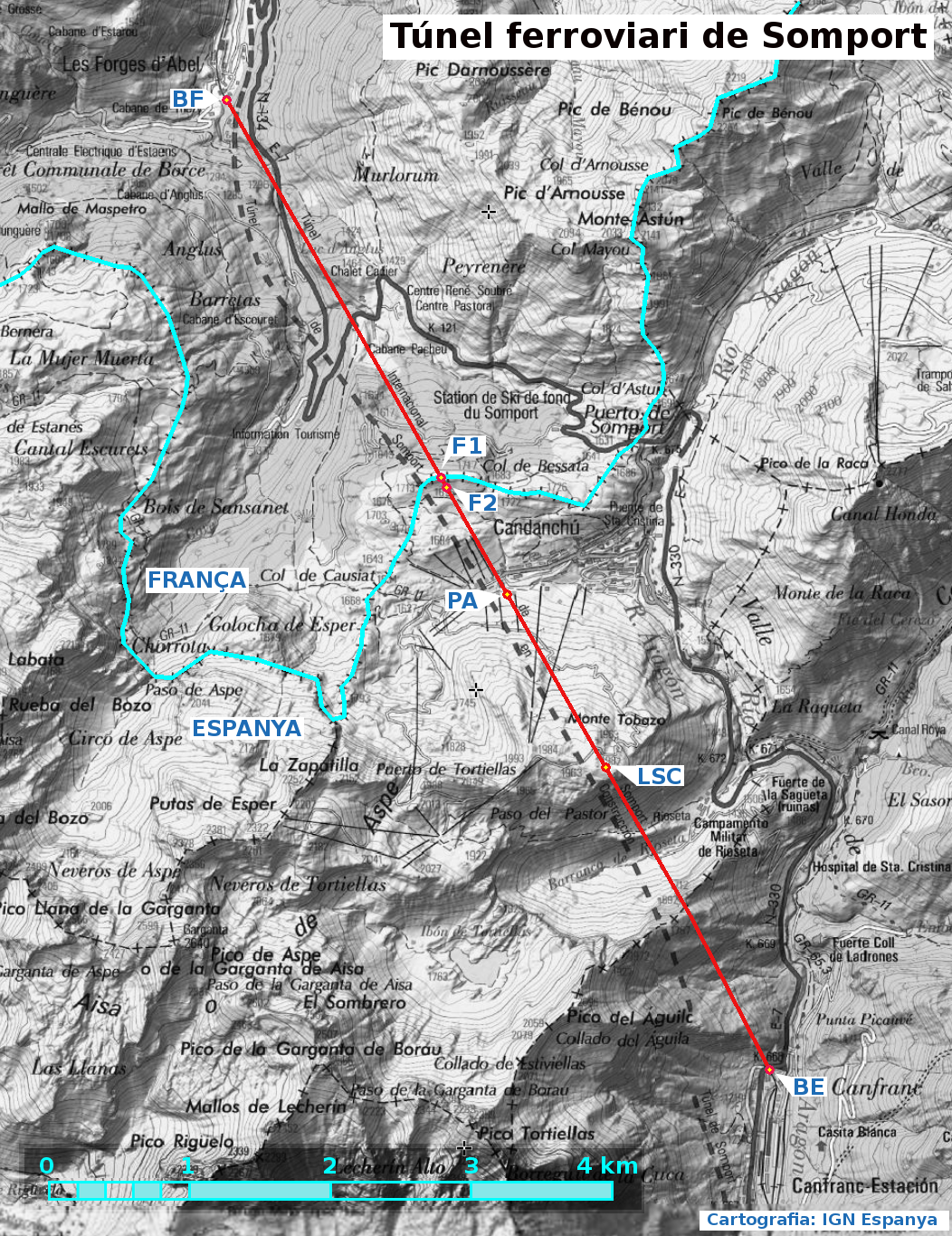 Gràfic del túnel ferroviari de Somport amb alguns punts singulars